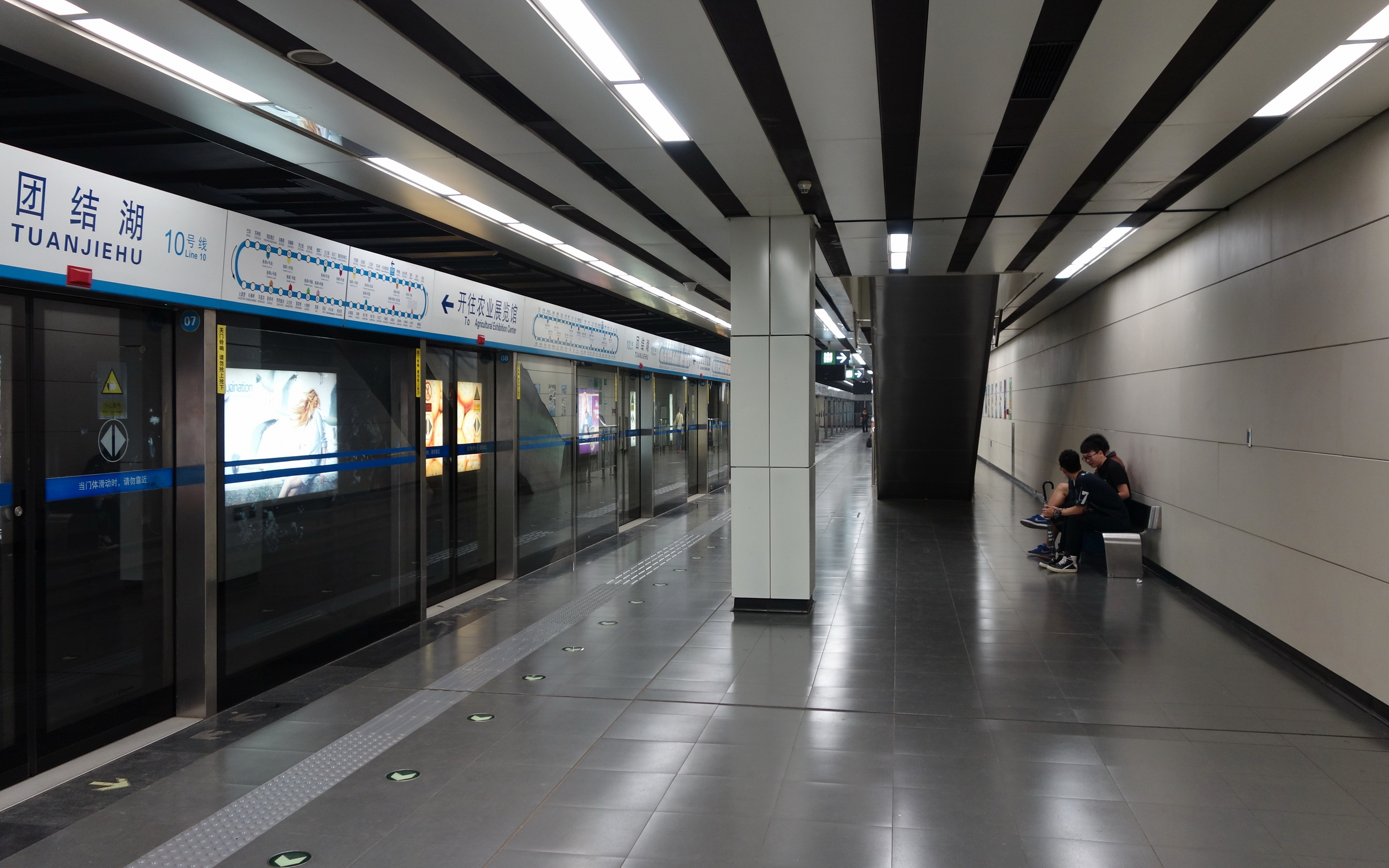 北京地铁10号线团结湖站站台